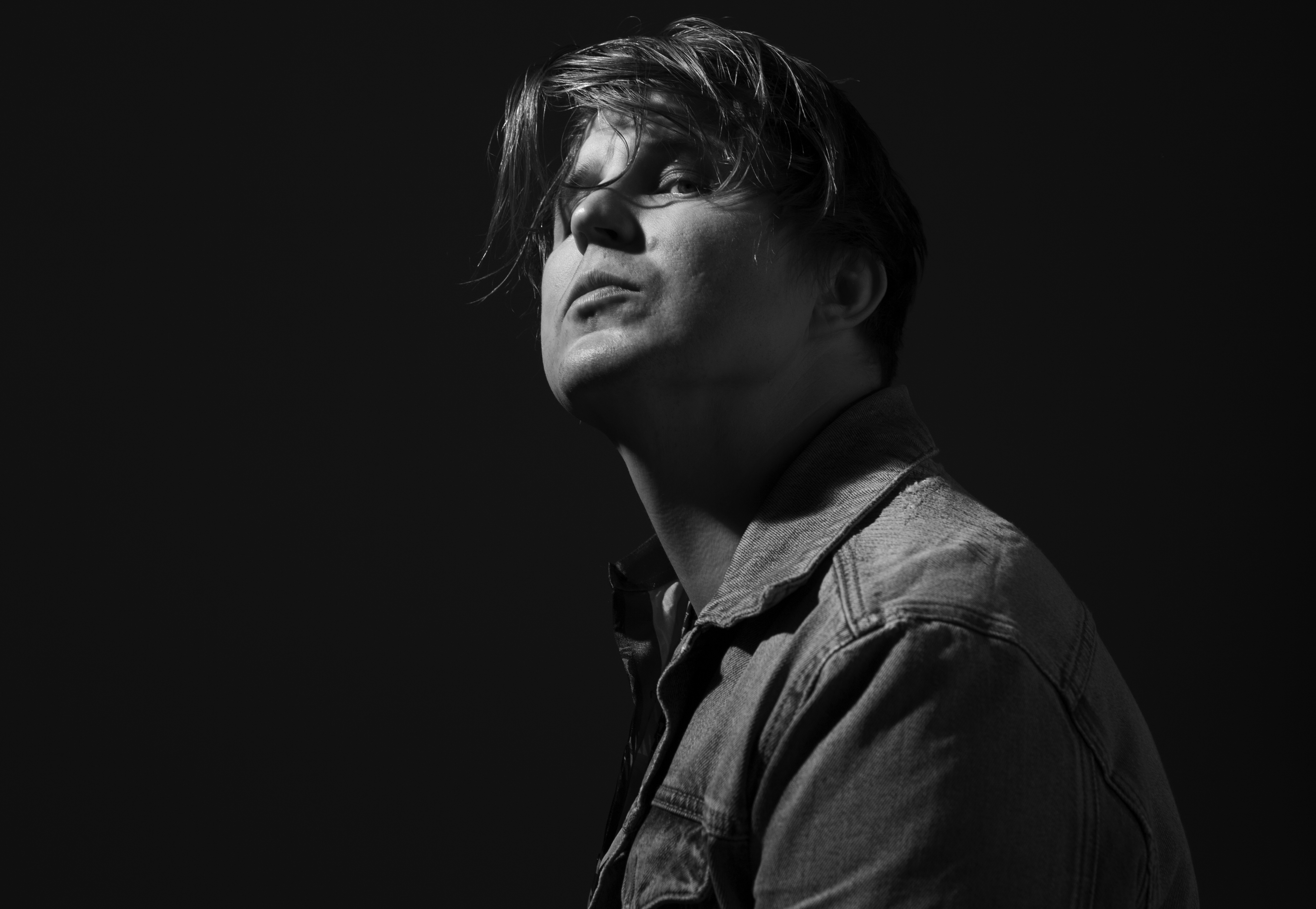 Markus Krunegård i Stockholm, februari 2018